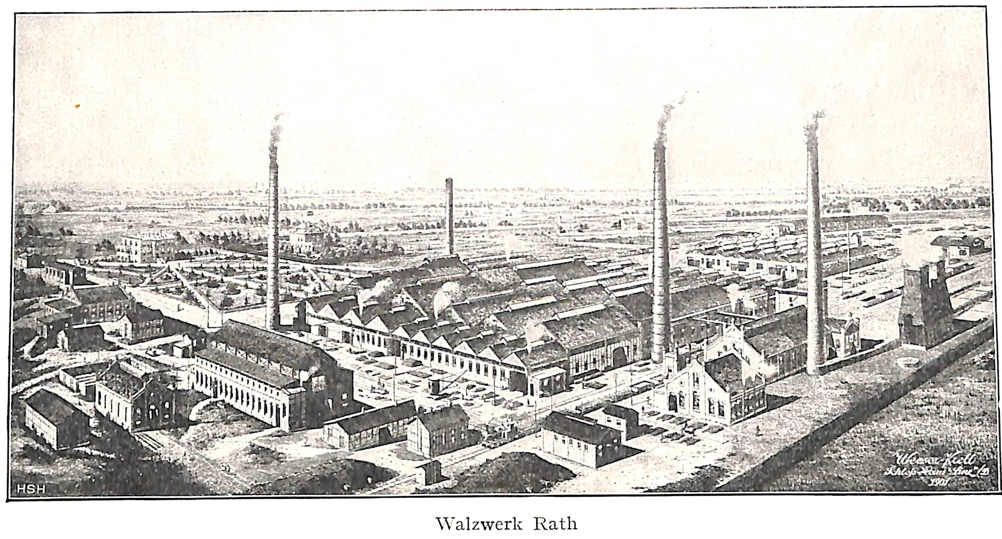 Düsseldorf - (fiktive) Ansicht der Mannesmann Röhren-Werke AG, Walzwerk Rath (Nachdruck des Originalfotos von 1901).